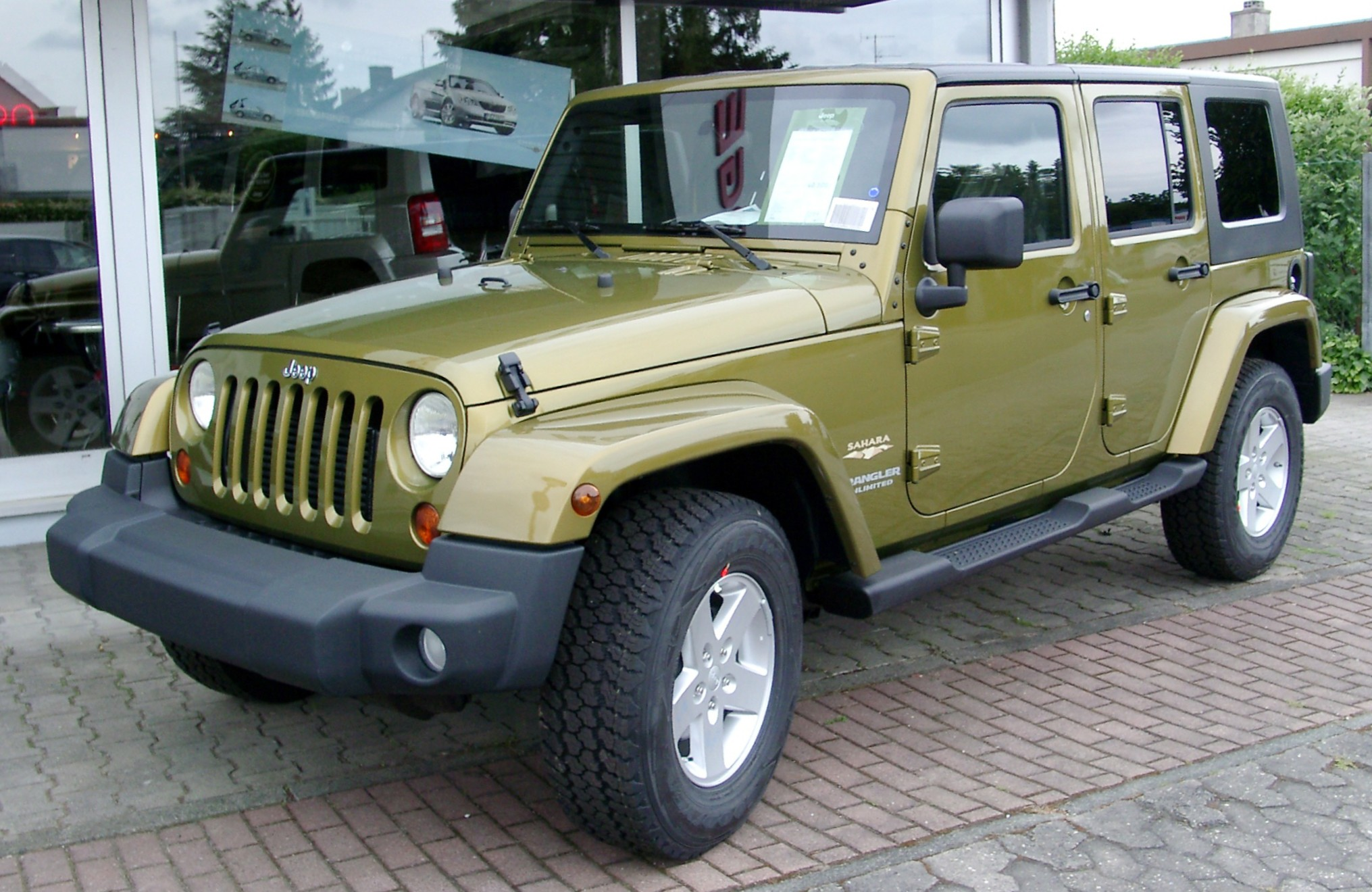 Jeep Wrangler Unlimited